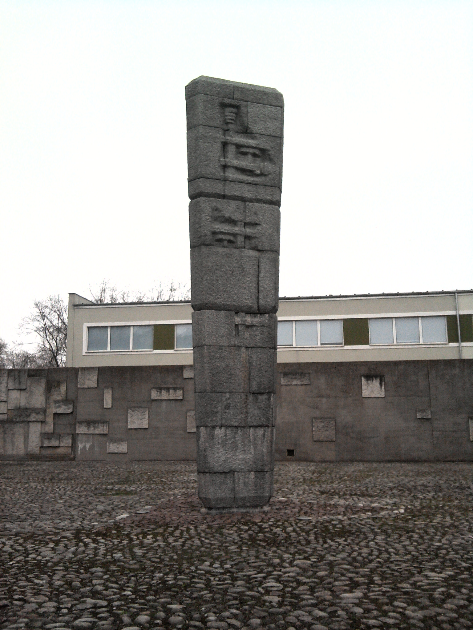 Obelisk.